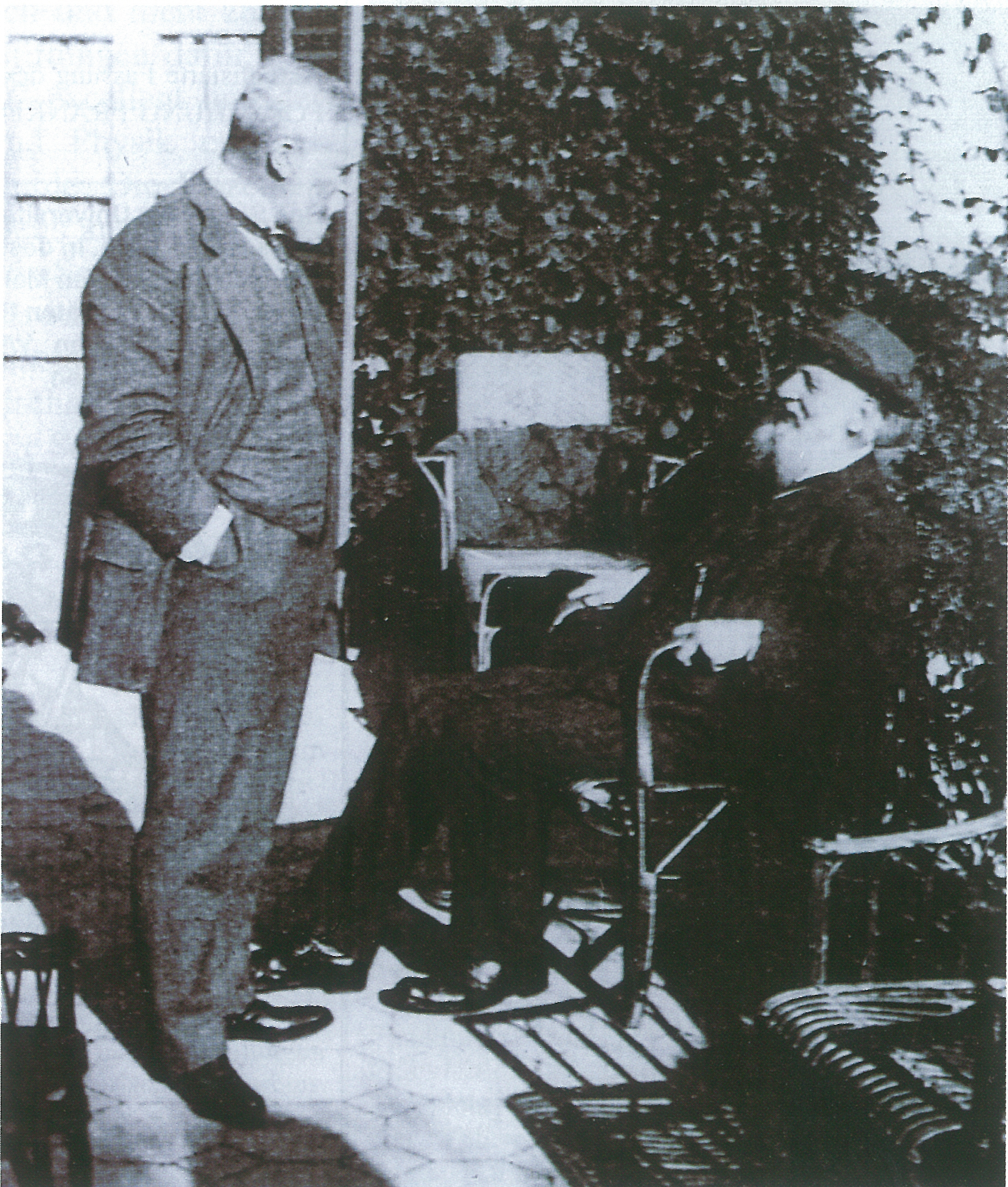 Wilhelm Merton im Gespräch mit Franz Adickes in Tremezzo